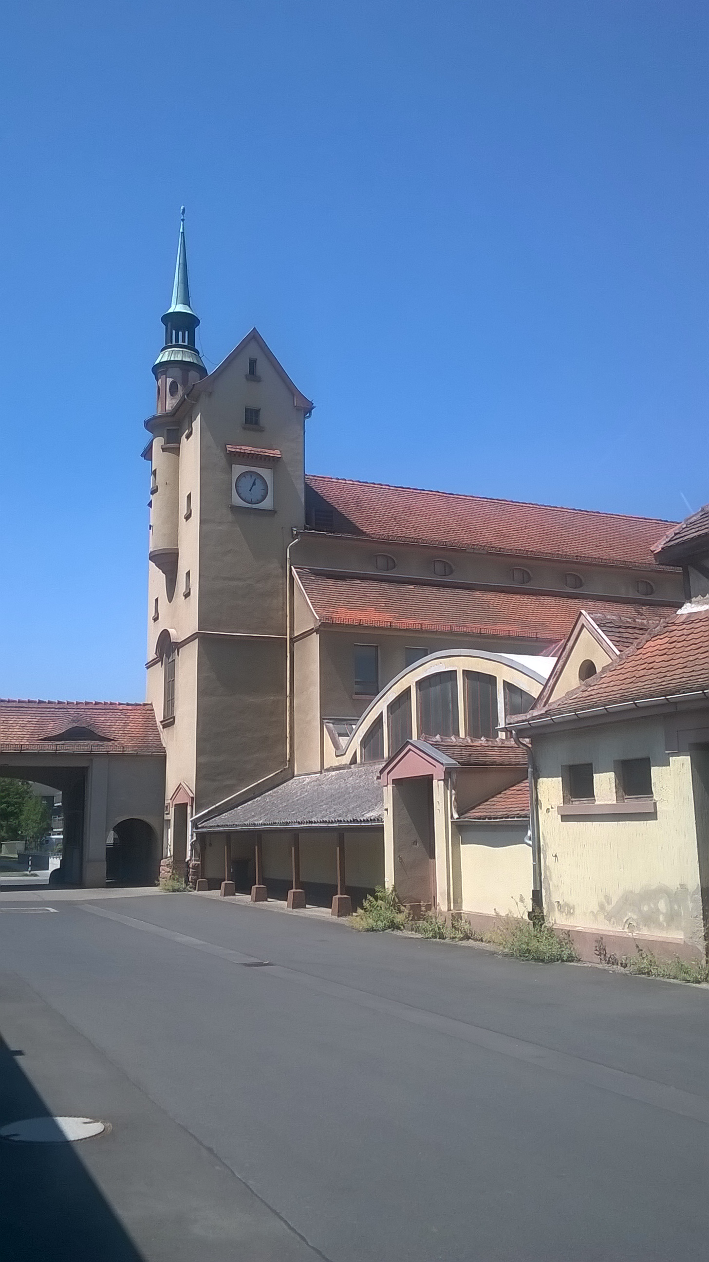 ehemalige Sozialgebäude und Badehaus Mainstraße 169, Ansicht von der Hofseite des Teerfarbenwerkes Oehler des Eduard Oehler, der damals viele, vorbildliche Sozialeinrichtungen im Werk einführte (z. B. Betriebskrankenkasse, Kantine, Dusch- und Baderäume). 1905 fiel der Betrieb an die Chemische Fabrik Griesheim Elektron. Sie führte die Sozialeinrichtungen weiter fort und ließ 1908 bis 1910 das Sozialgebäude an der Mühlheimer Straße Ecke Friedhofstraße, an der südwestlichen Ecke des Firmengeländes, errichten. Der Architekt des imposanten Gebäudes war der Schweizer Hans Bernoulli.